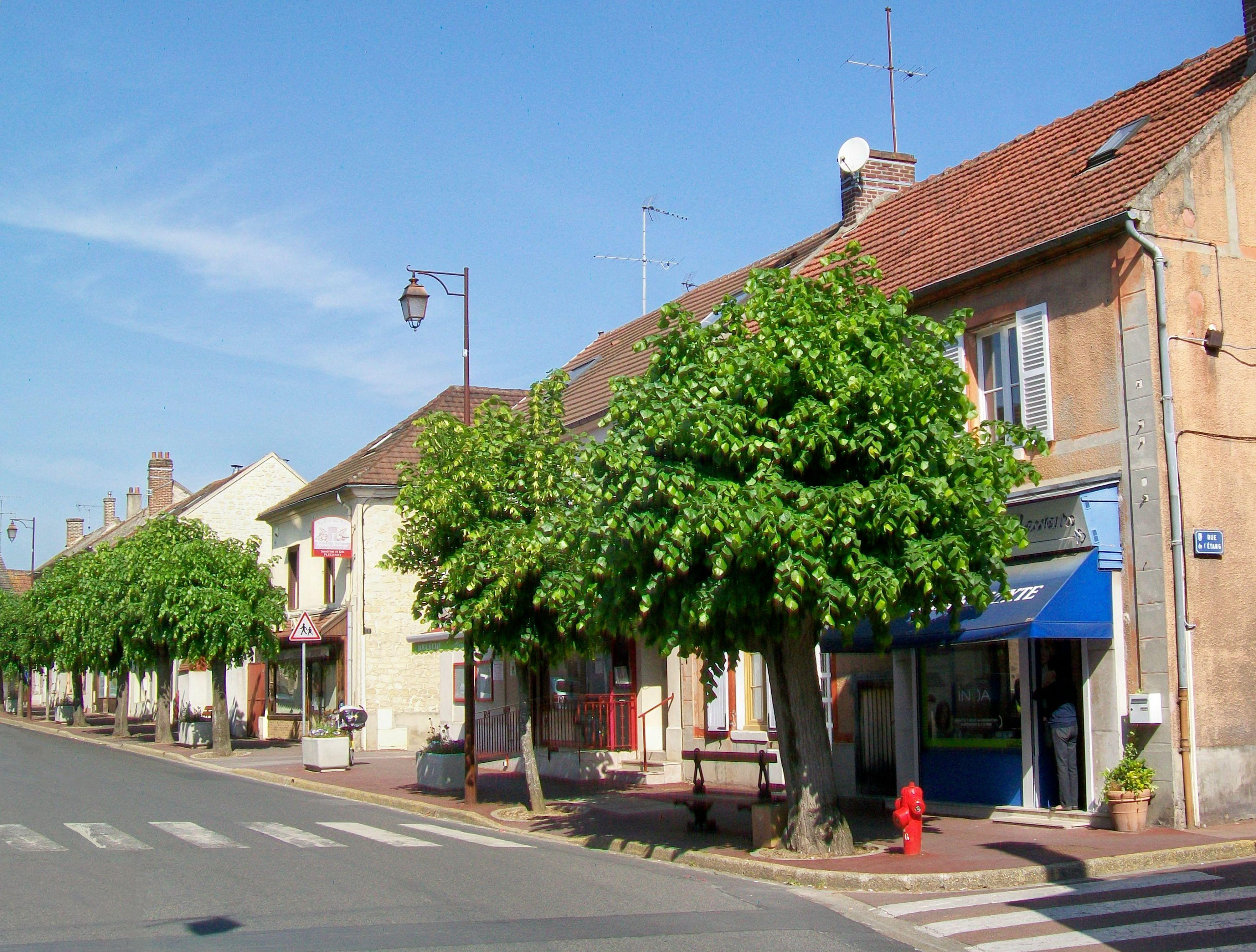 La partie centrale de la Grande Rue, avec un alignement de cinq commerces, dont boucherie-charcuterie-traiteur, boulangerie-pâtisserie, primeur / vins, mais aussi nombre de commerces abandonnés.